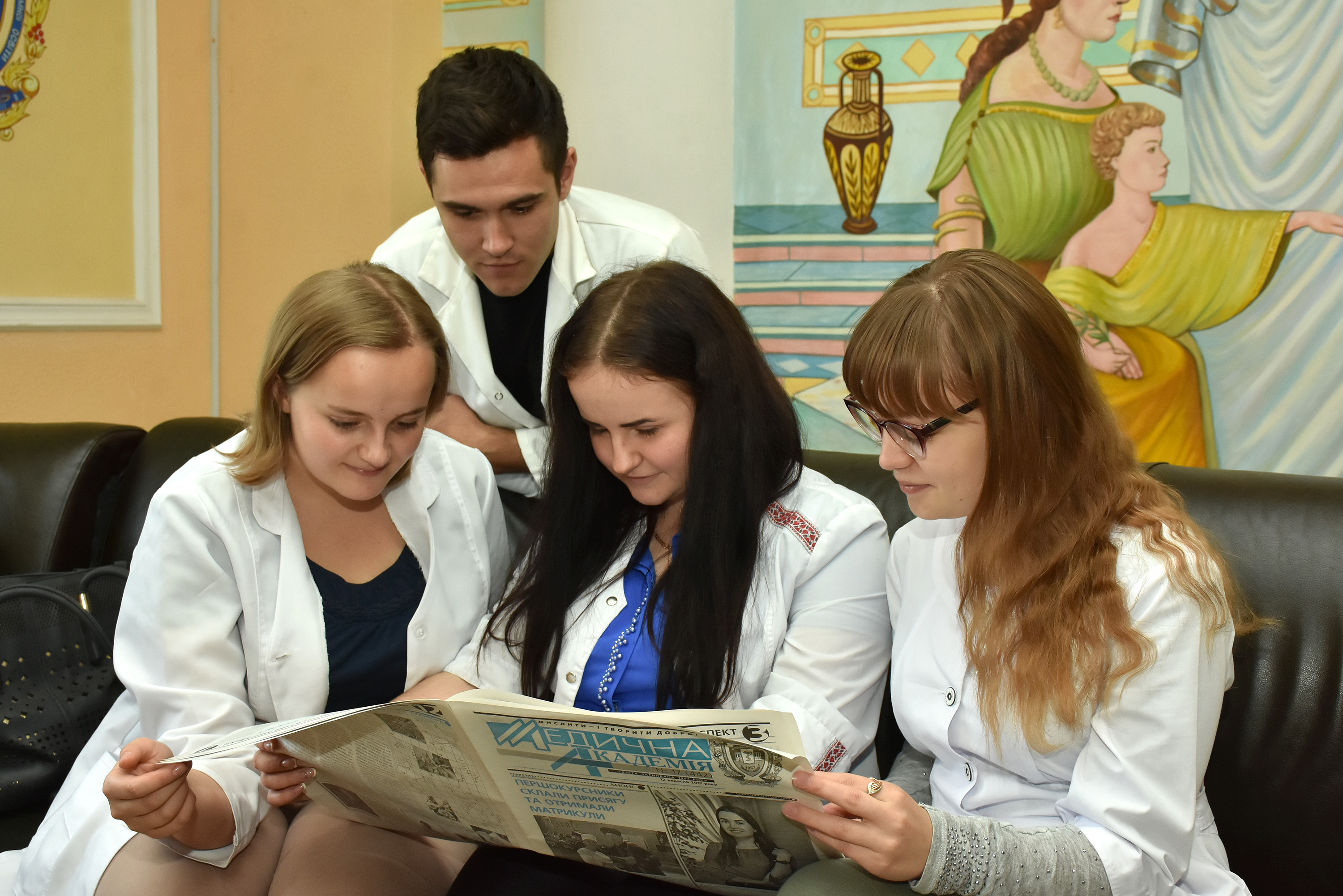 Студенти 3 курсу медичного факультету Тернопільського державного медичного університету імені І. Я. Горбачевського Наталія Бакинська, Ірина Брегін, Іванка Рибак та Андрій Перев’язко читають «Медичну академію».